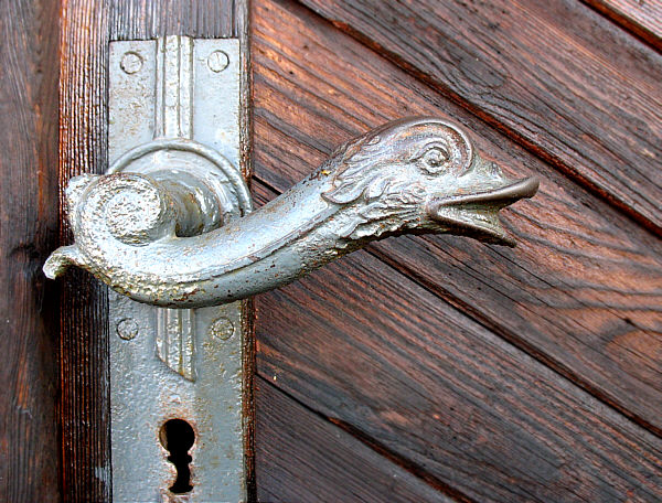 Dorfkirche Pinnow: Türklinke der Eingangstür